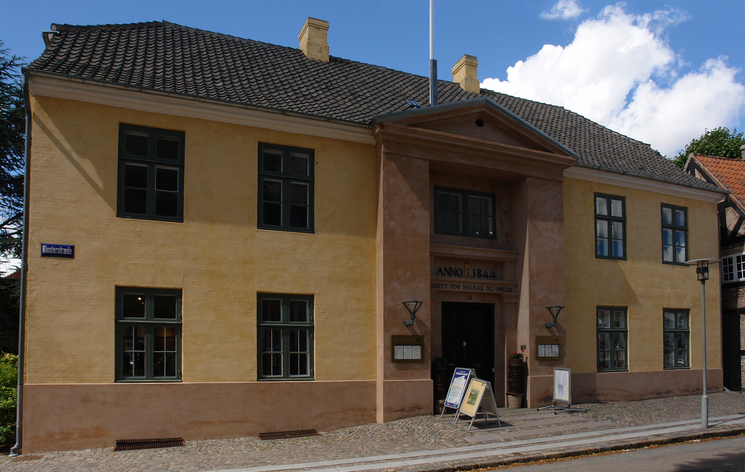 Holbæk Museum: Klosterstræde 18 - Das alte Rathaus von 1844